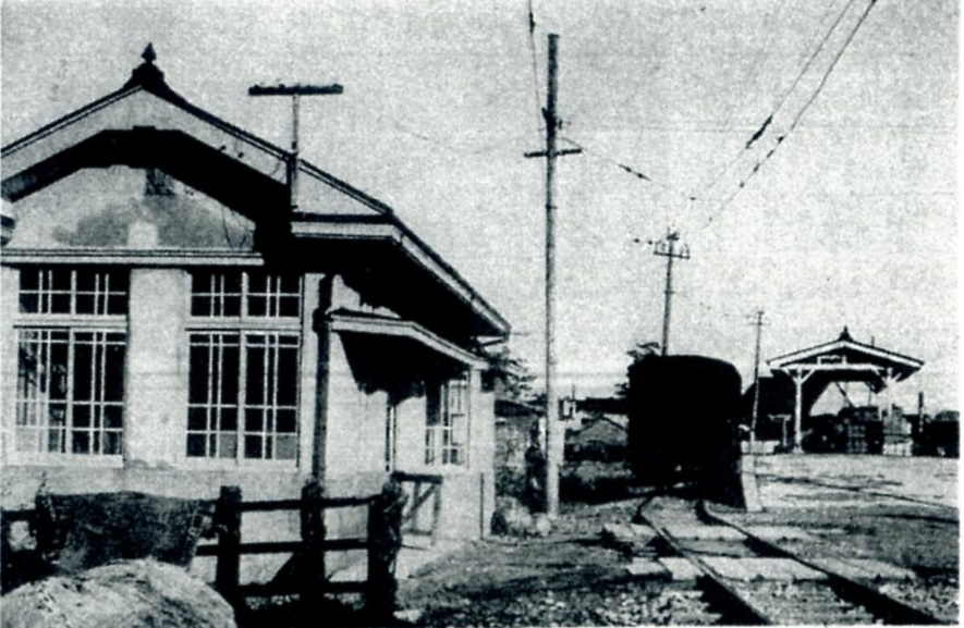 越中鉄道堀岡駅（昭和15年）